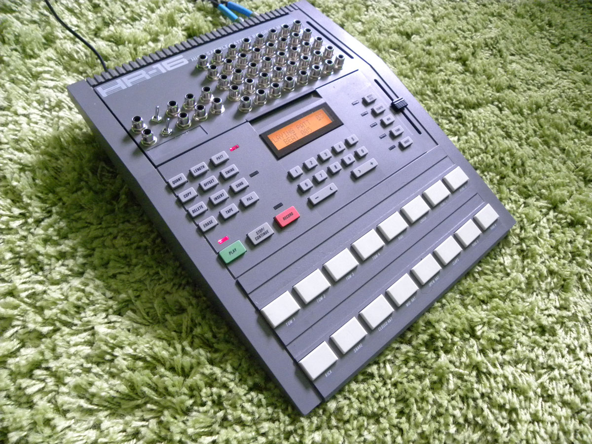 Alesis HR-16 circuit bent 07